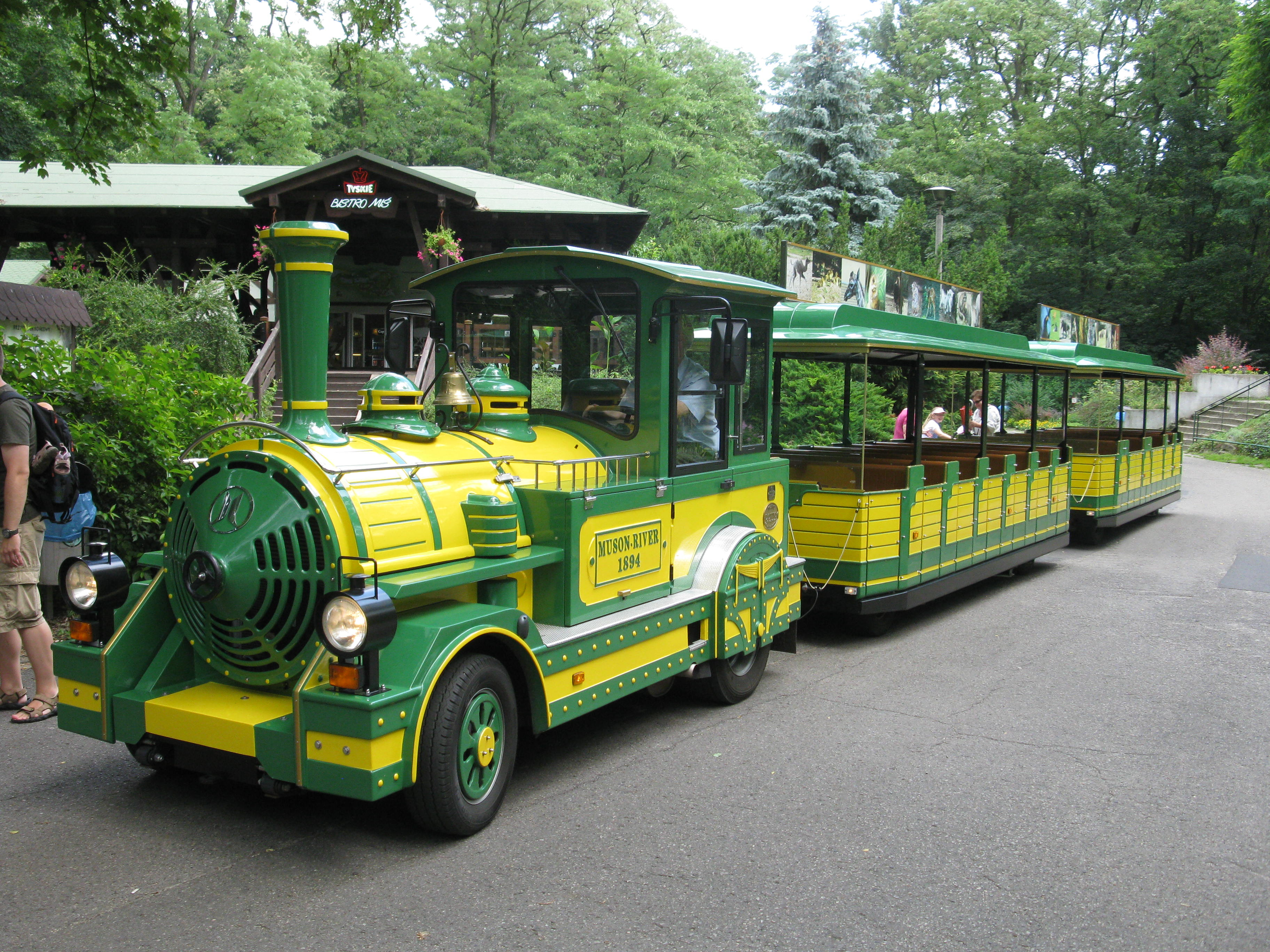 Kolejka parkowa "Zwierzynka" w Nowym Zoo w Poznaniu